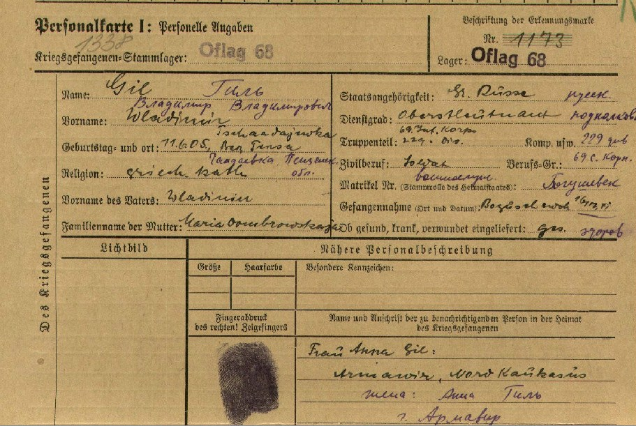 Карточка военнопленного подполковника Красной Армии Владимира Владимировича, заведённая в лагере для пленных офицеров «Офлаг-68» в Сувалках.